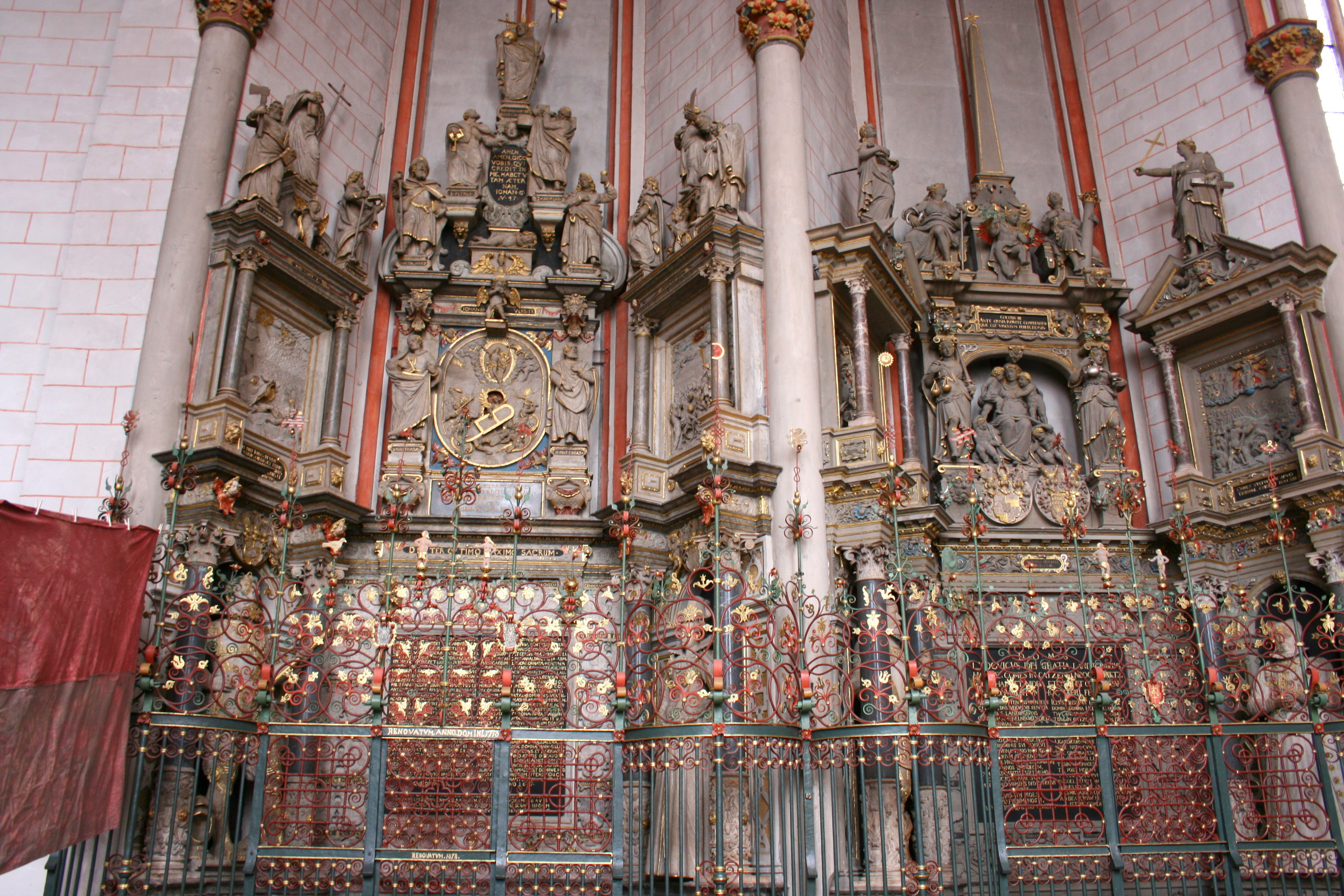 Lutherische Pfarrkirche in Marburg